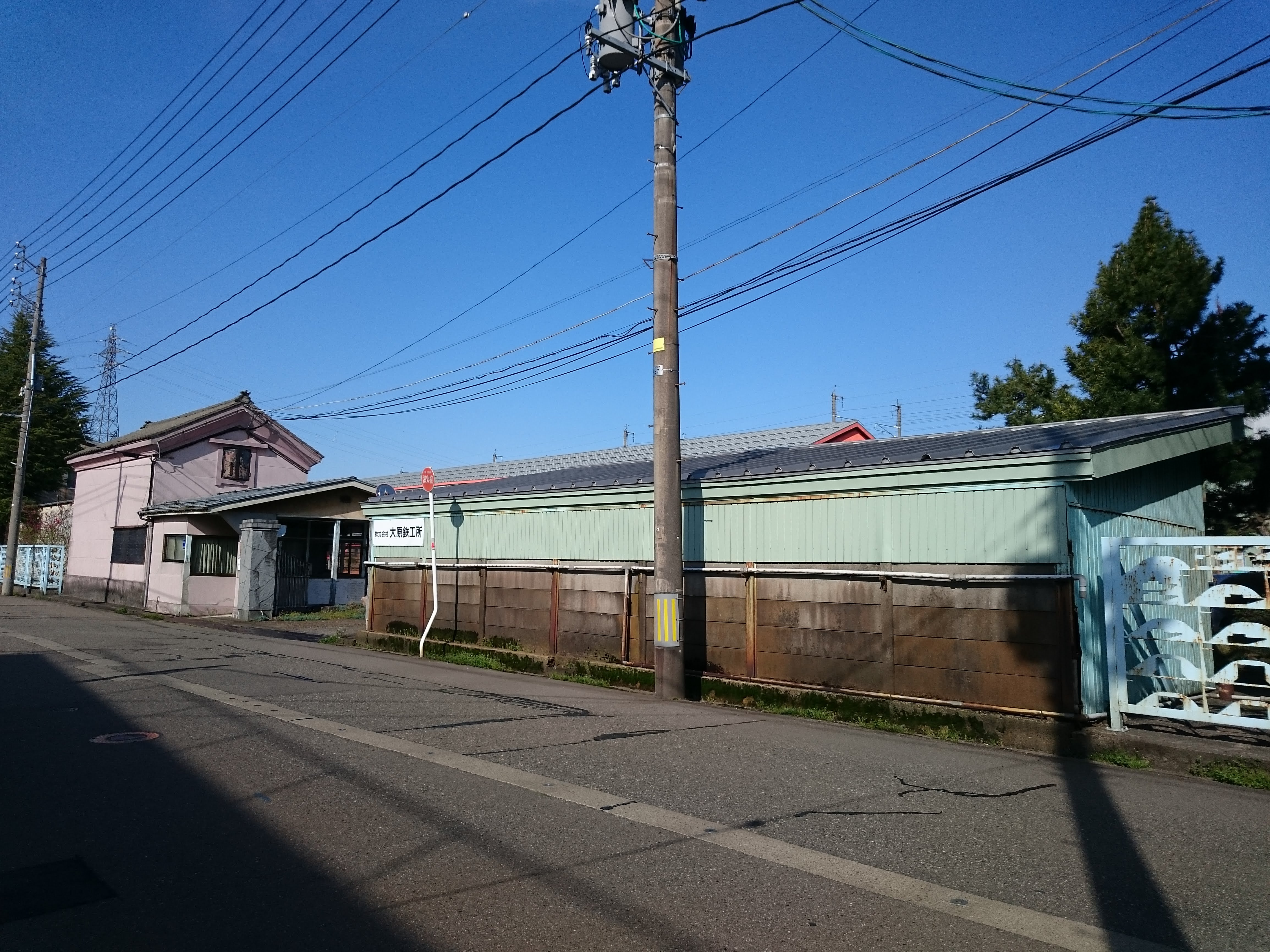 大原鉄工所の本社外観